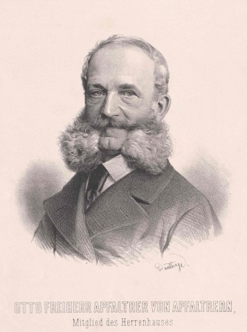 Otto Apfaltrer von Apfaltrern (1823 - 1905), Rakouský šlechtic a politik.